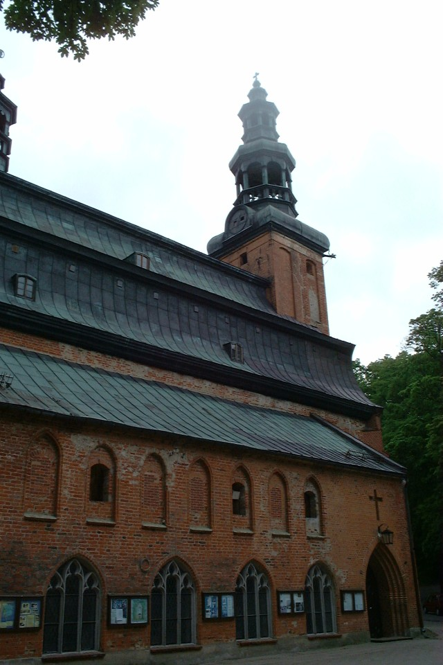 Poland, Kartuzy - church.